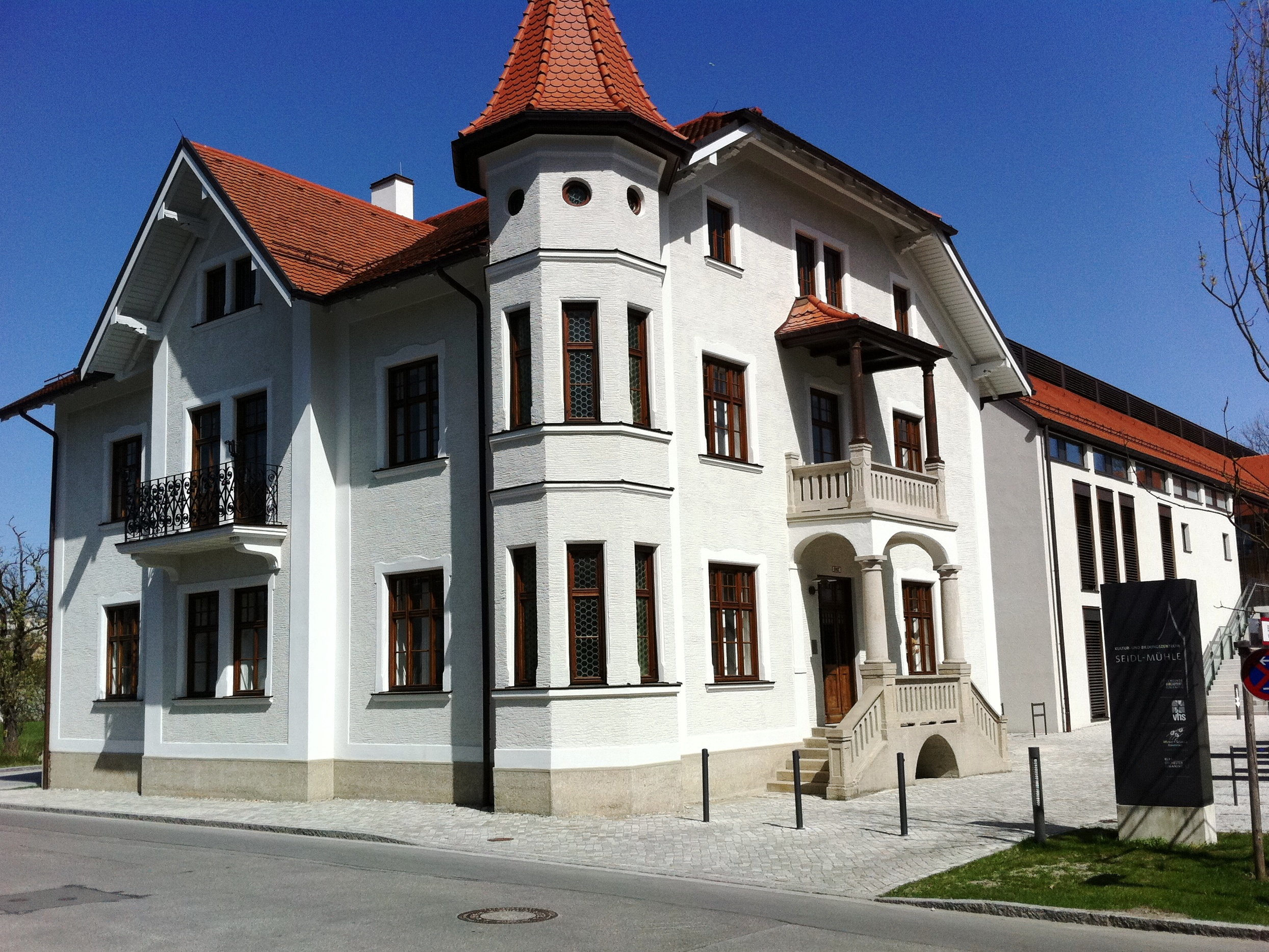 Denkmalgeschützte Seidl-Mühle, jetzt kommunales Kulturzentrum in Ismaning, Landkreis München, Bayern